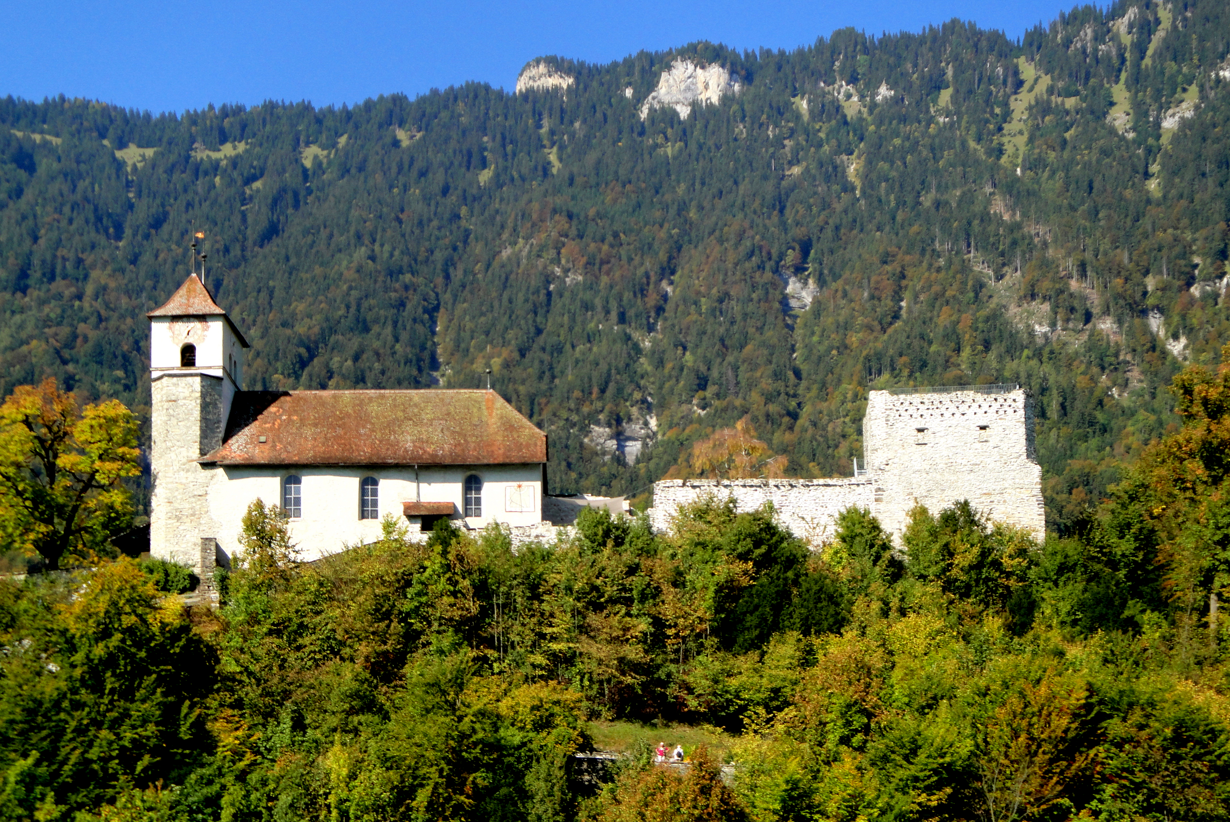 Ringgenberg, Kirche und Burgruine